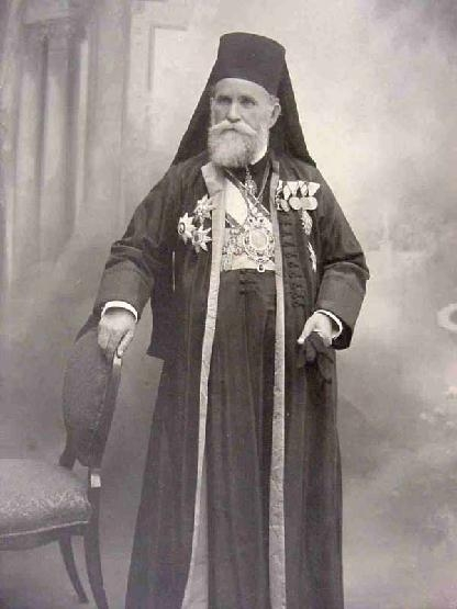 митрополит Черногорский Митрофан (Бан)